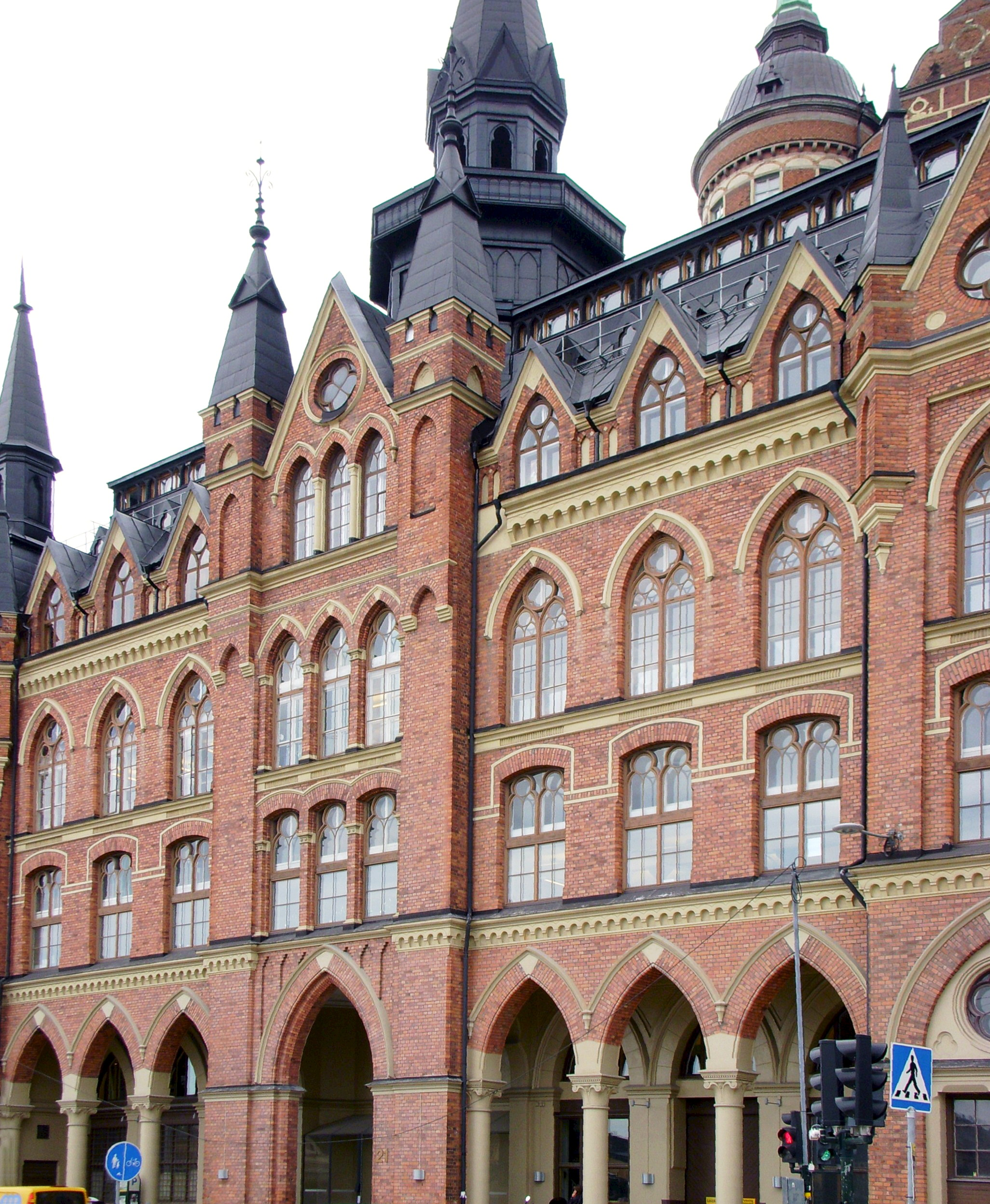 Mariahissens fasad mot Söder Mälarstrand, Stockholm